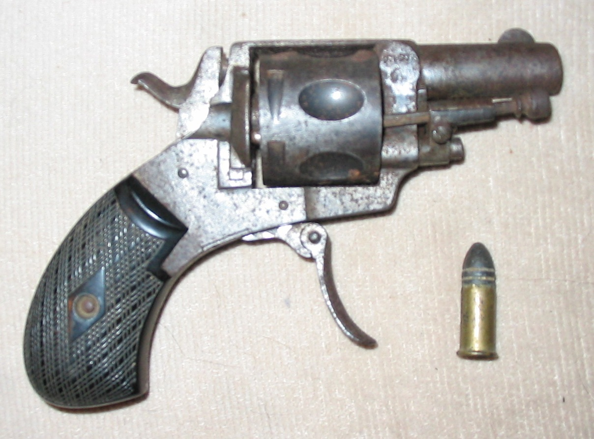 Revolver Manufacture d’armes de Saint-Etienne.